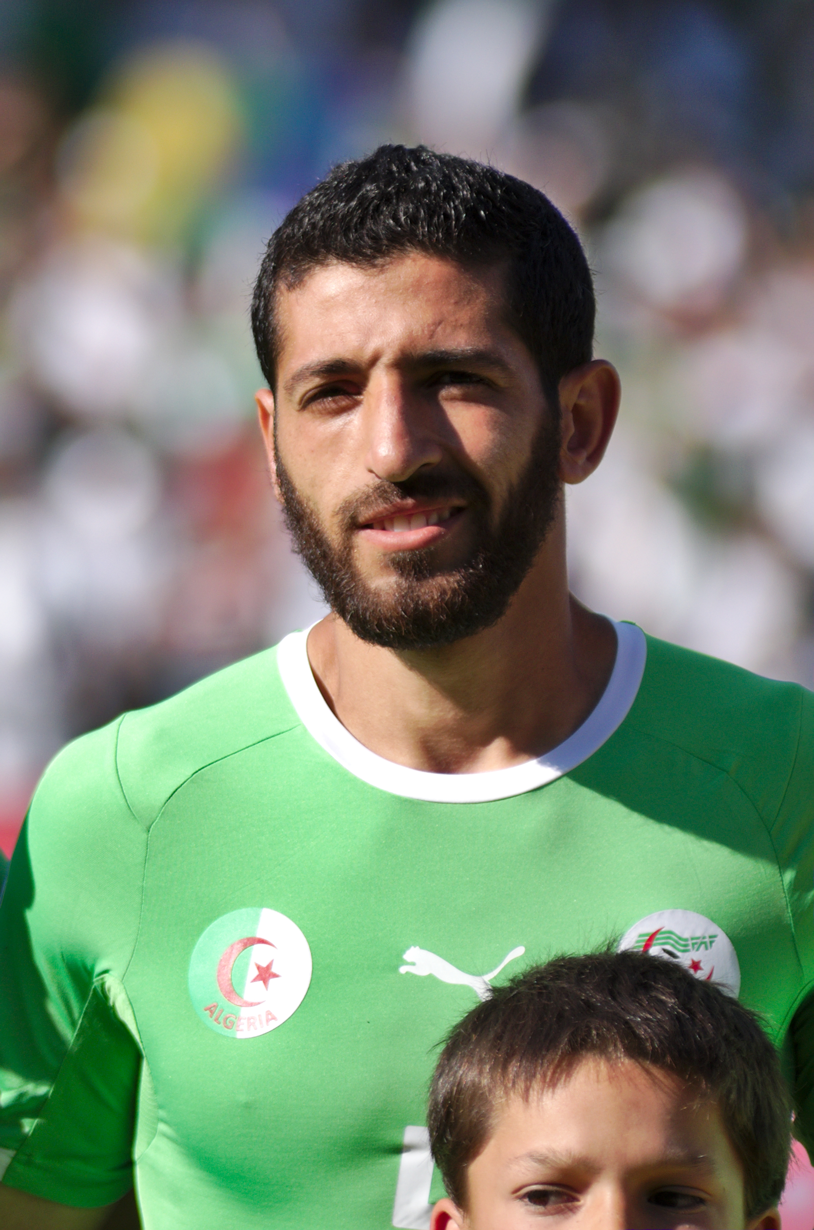 Algérie - Arménie - 20140531 - Rafik Halliche